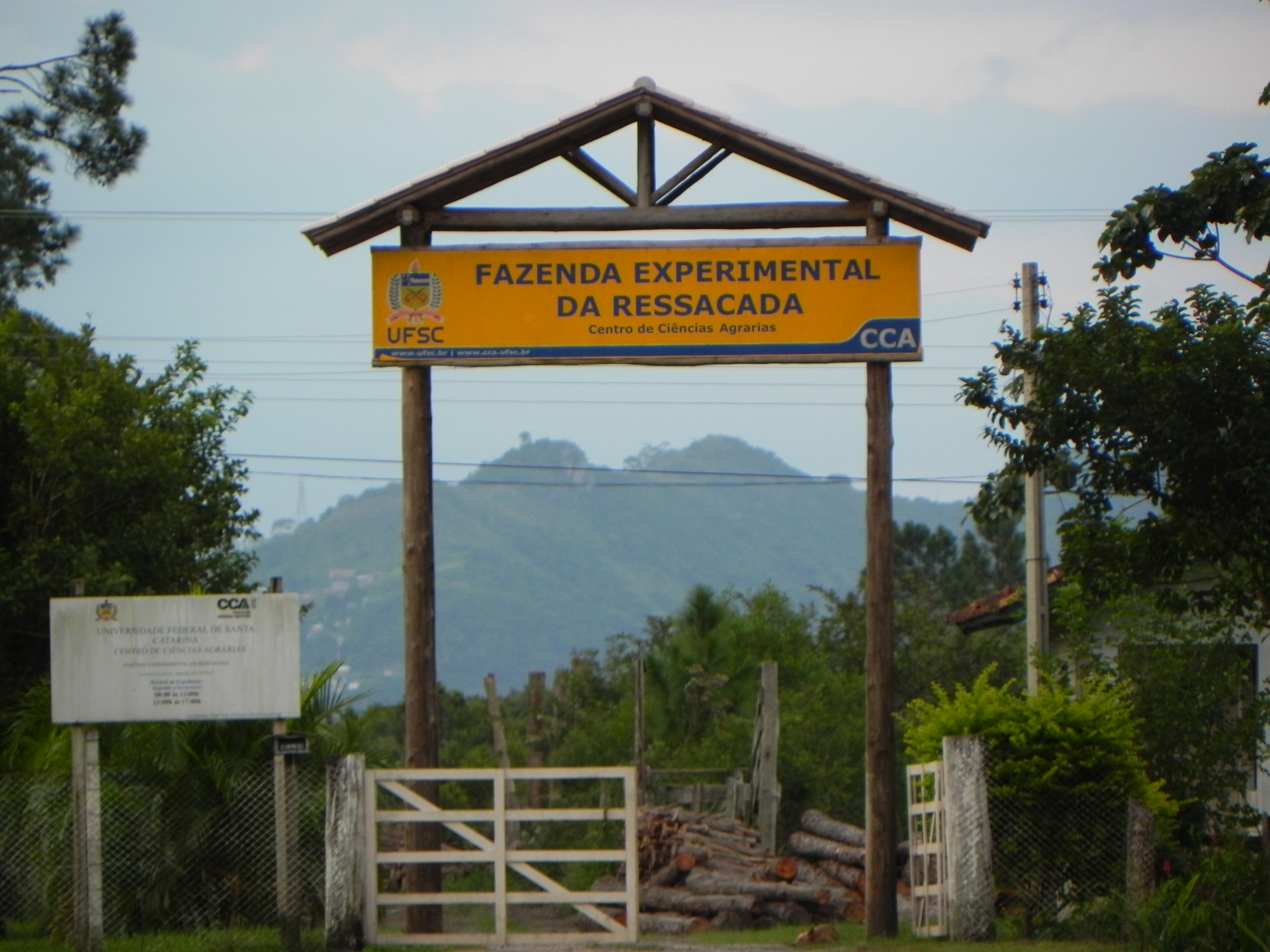 Entrada da Fazenda Experimental da Ressacada, pertencente a Universidade Federal de Santa Catarina - Centro de Ciências Agrárias.